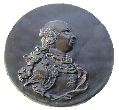 GNU-FDL Herzog Karl Eugen Stuttgart 2004- Denkmal im Schlosspark Hohenheim - selbst fotografiert am 8.9.2004